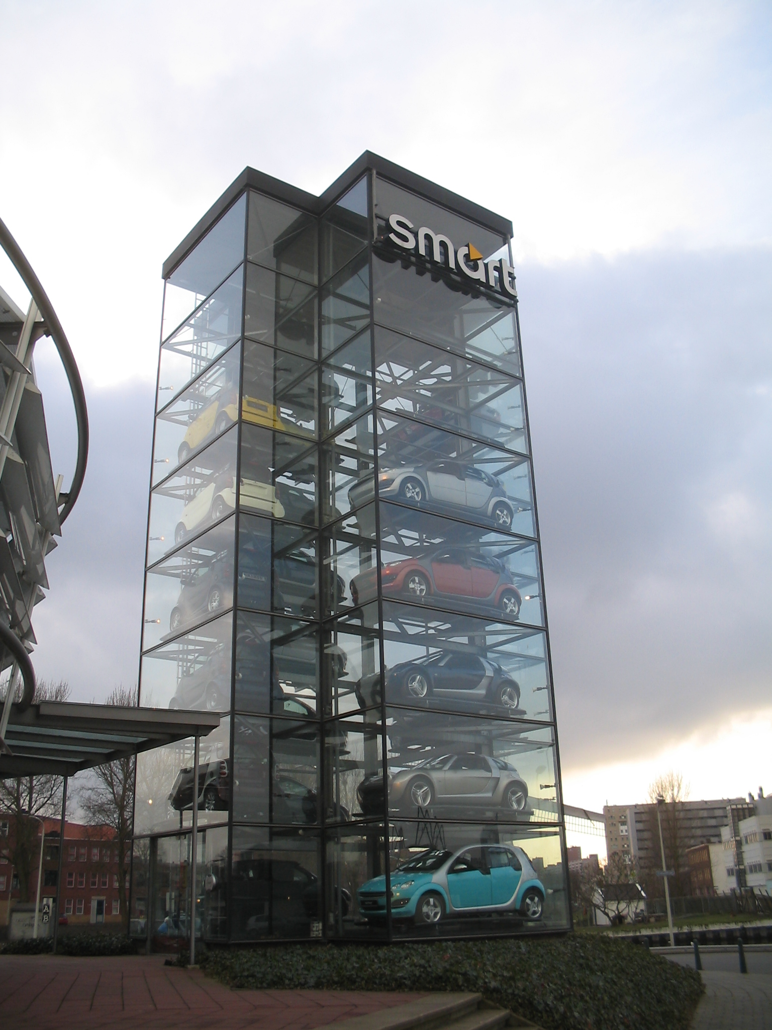 Smart Centre, Den Haag, feb. 2006